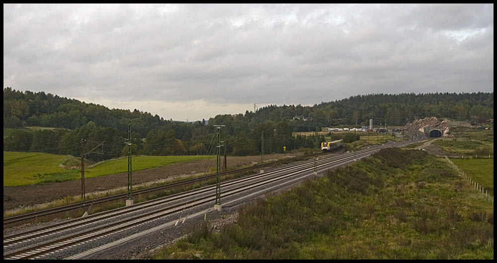 Ett regionaltåg mot Göteborg C passerar här den södra tunnelmynningen av Nygårdstunneln på banan mot Göteborg. Tågen går nu på den nya banan i en 3km lång tunnel i farter upp till 200km/h.